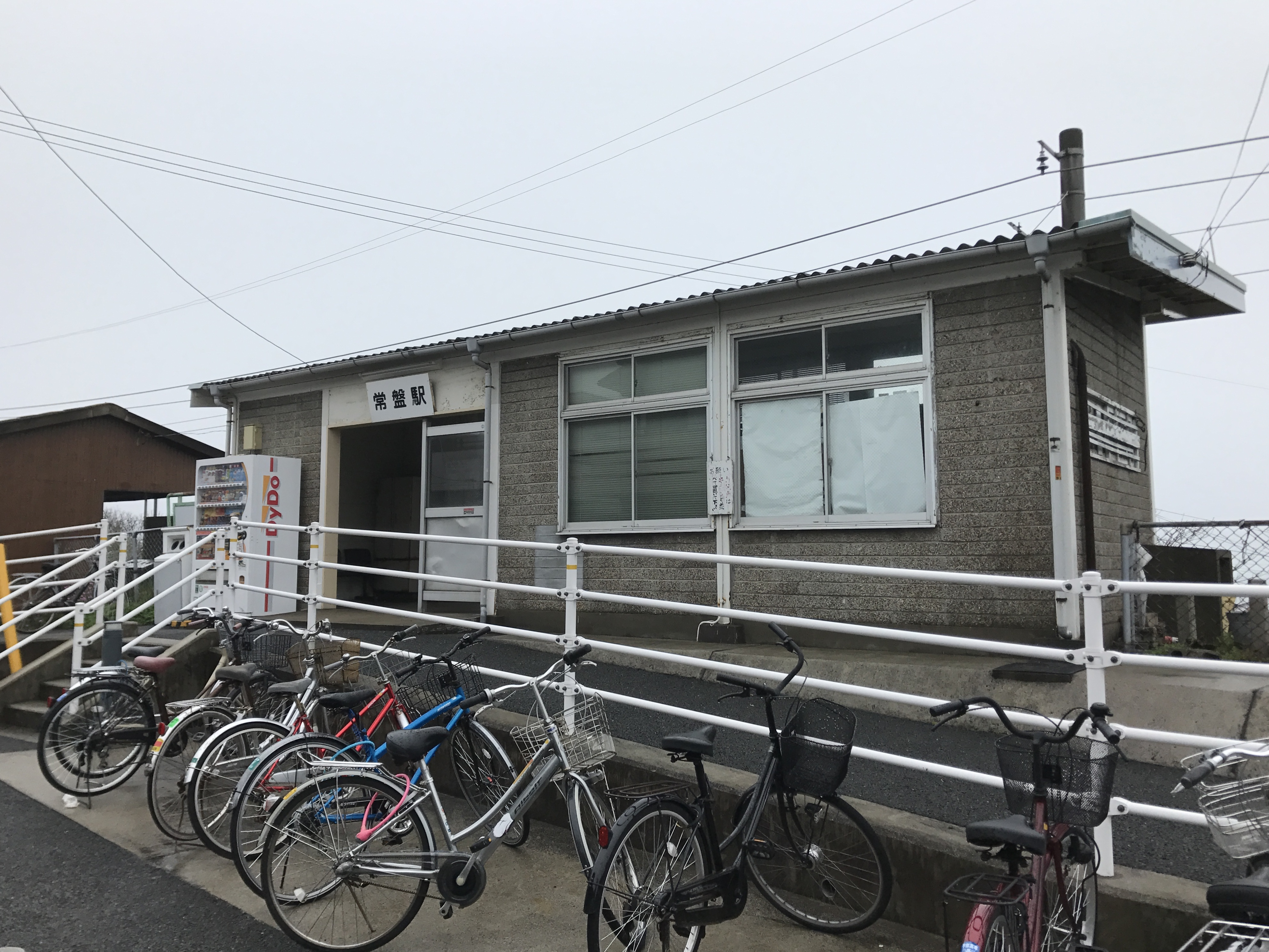 常盤駅駅舎